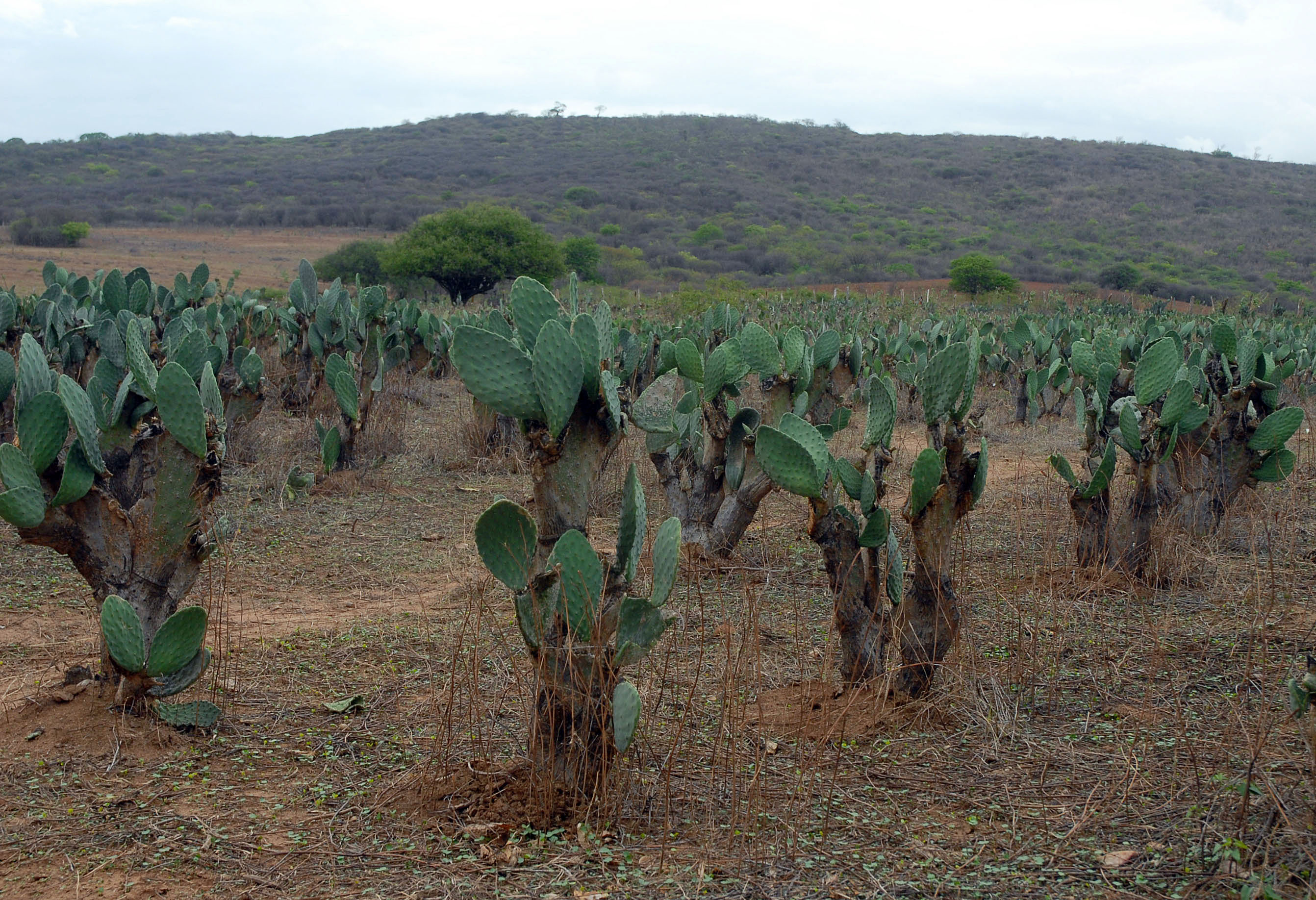 Urandi (BA) - Plantação de palma (O. cochenillifera), a única comida para o gado durante a seca, na propriedade do agricultor Edgar Souza Carvalho